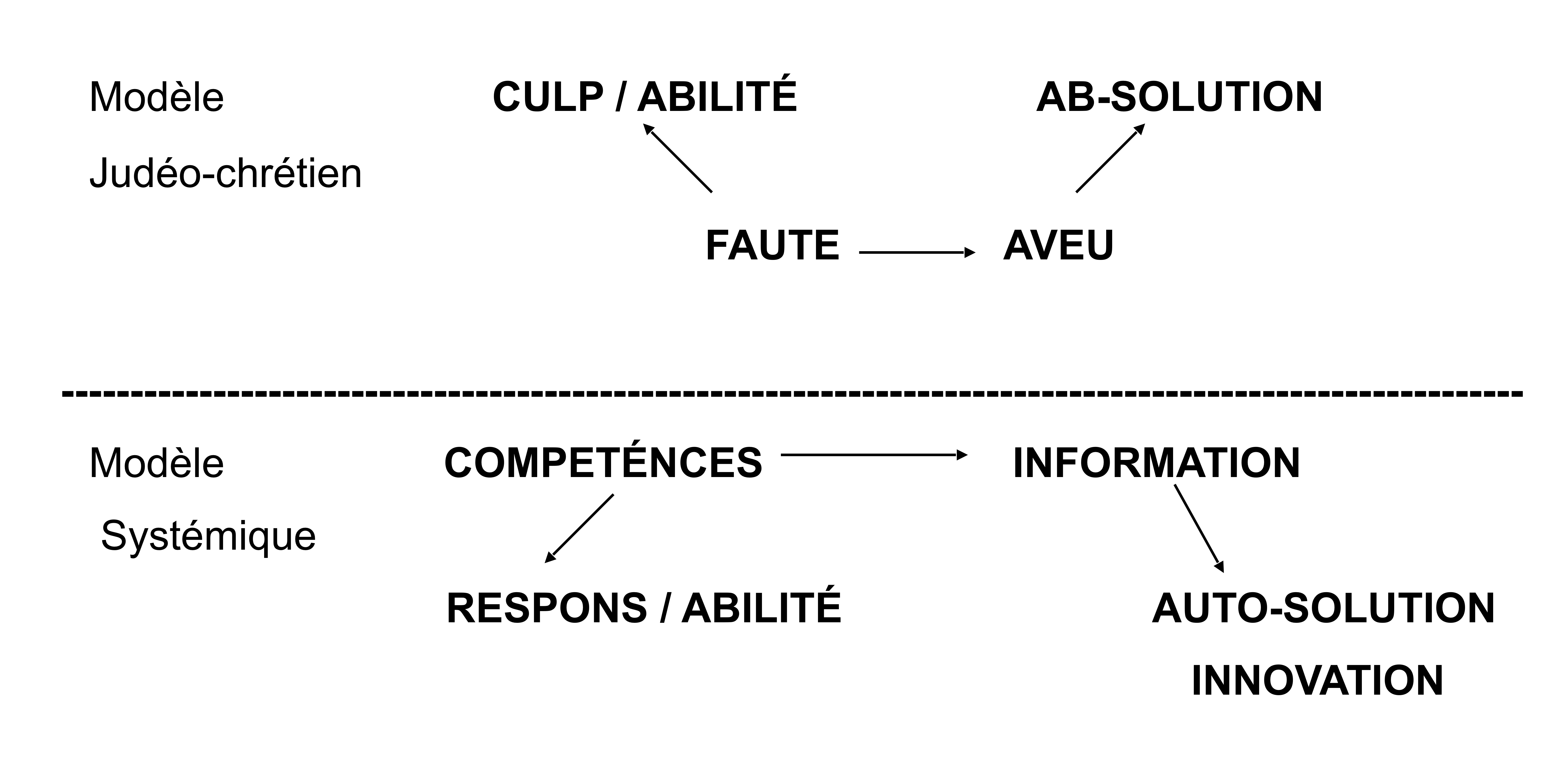 Du modèle judéo-chrétien au modèle systémique.